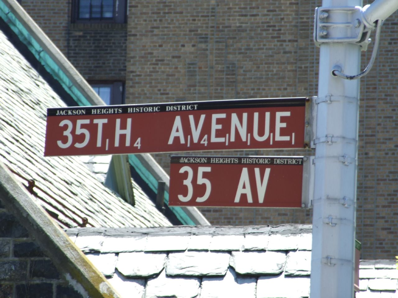 nyc 063